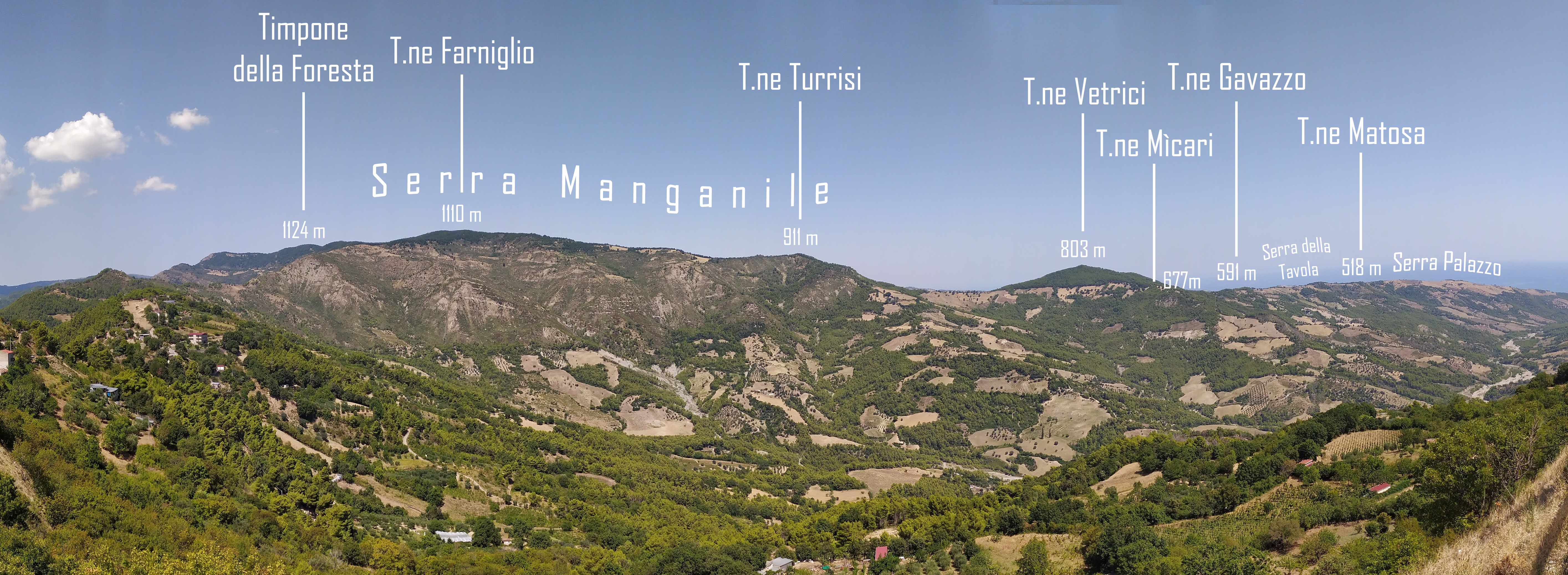 Grandangolo Manganile